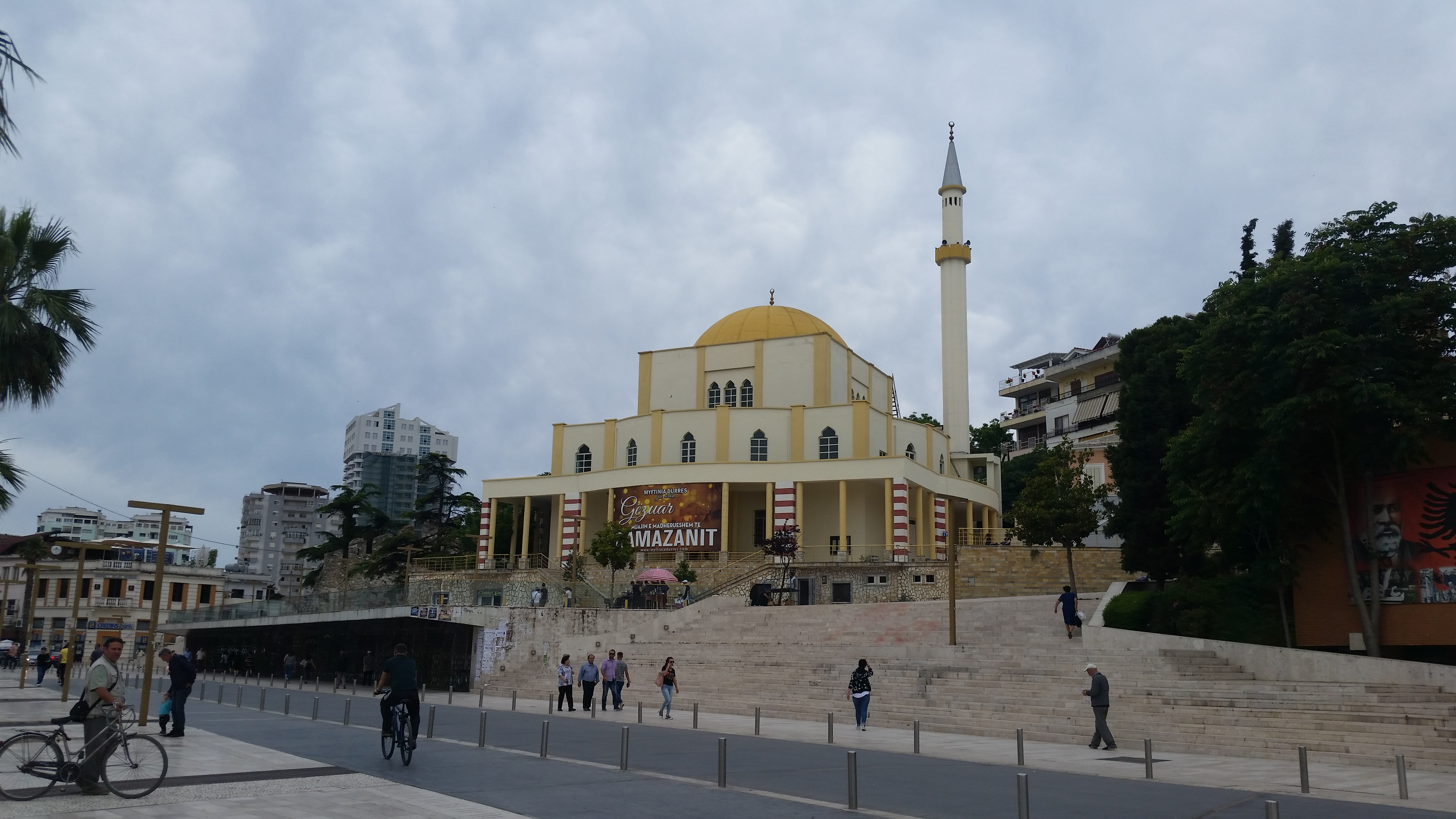 Xhamia e Madhe u ndërtua në vitin 1938